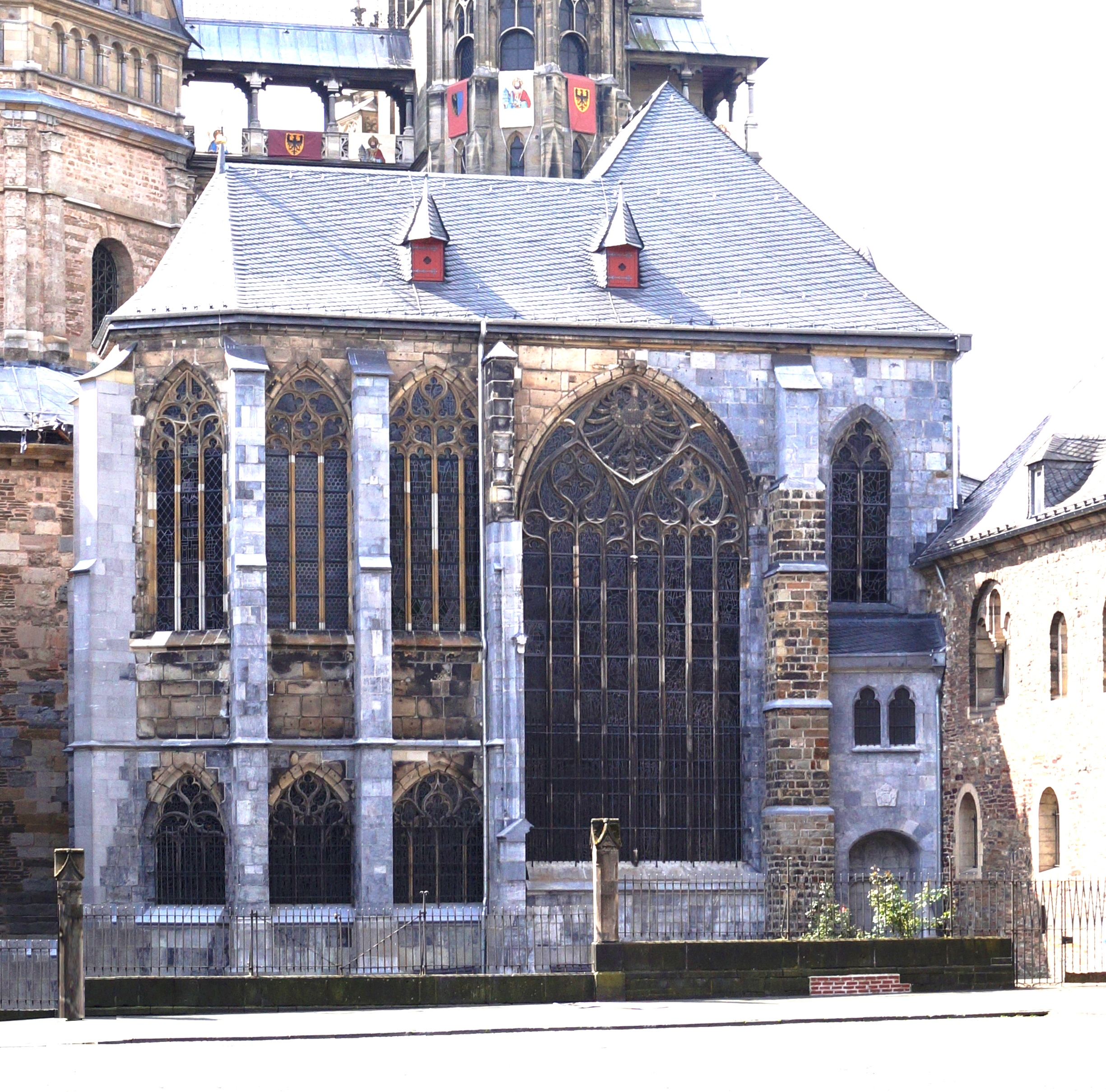 Aachener Dom Nikolauskapelle